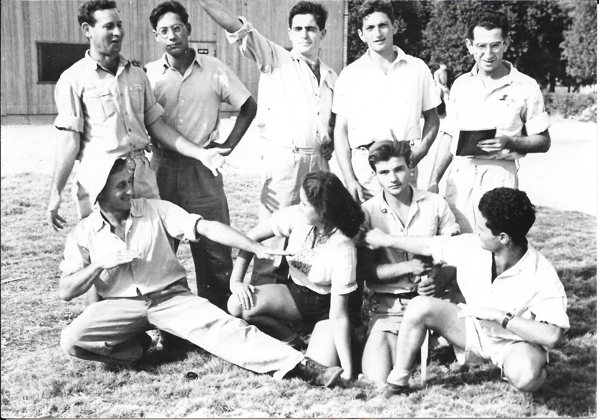 להקת הזמר שקדמה ללהקות הצבאיות. 'להקת תת מקלע' עומדים מימין לשמאל זב, סמק, חיים גורי נתניאל יצחק לבני , שורה תחתונה עוזי נרקיס רל, דיתה, שאול ביבר. 1944